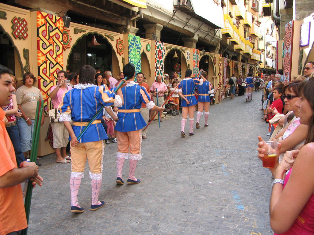 Els Torneros en el Sexenni de Morella de 2006 (Els Ports)